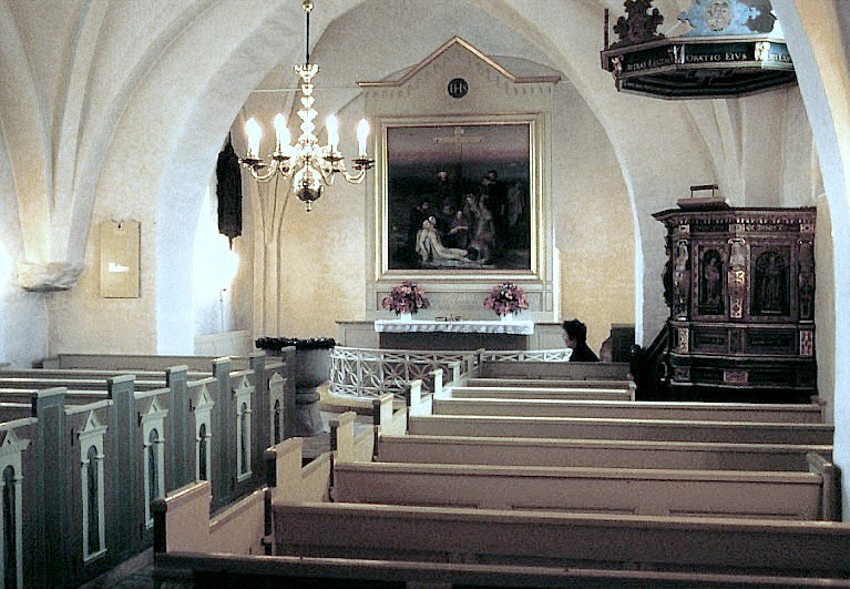 Bårse Kirke i Danmark. Skibet set mod øst